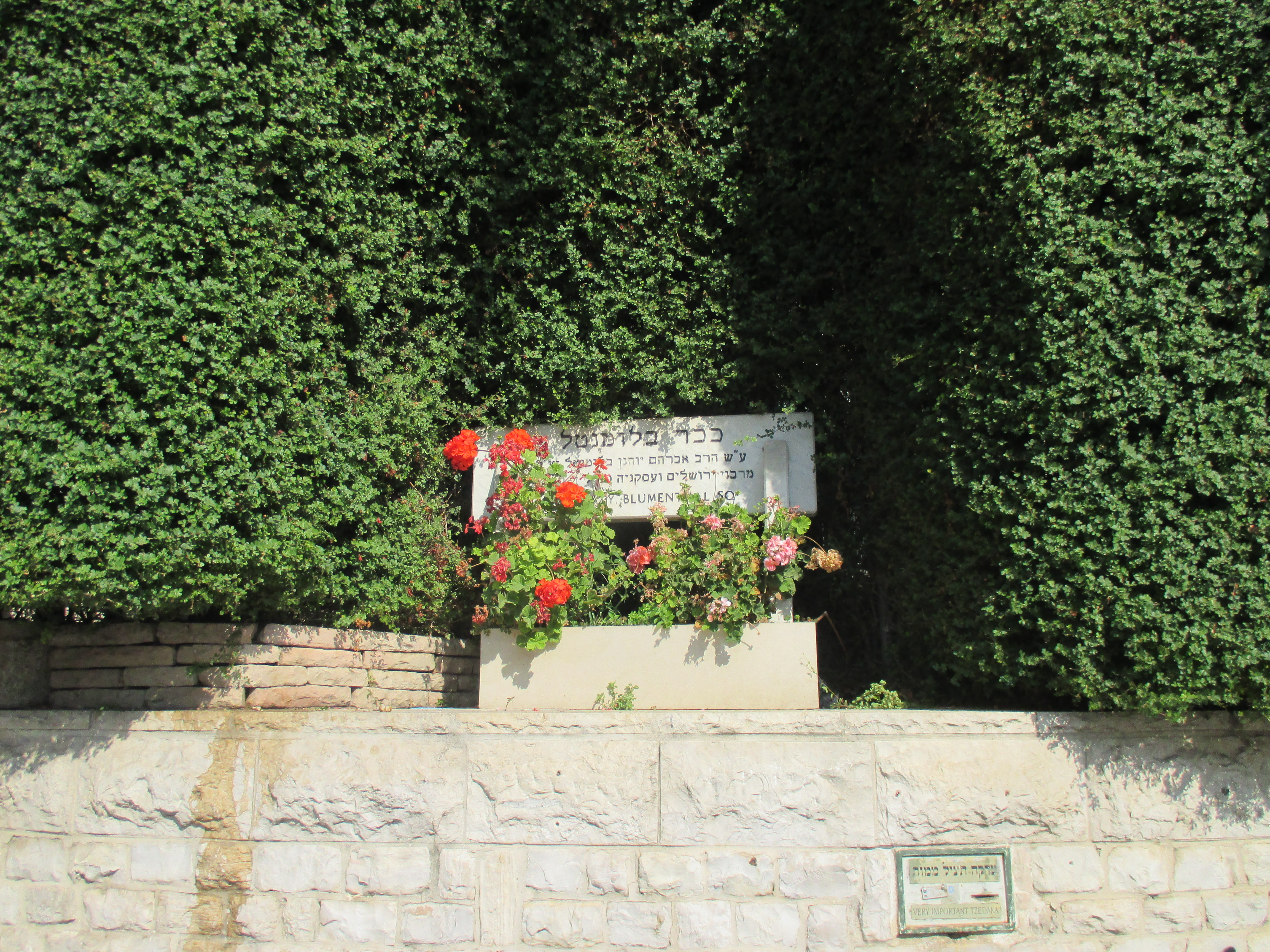 כיכר על שם אברהם יוחנן בלומנטל על יד בית היתומים בלומנטל בירושלים